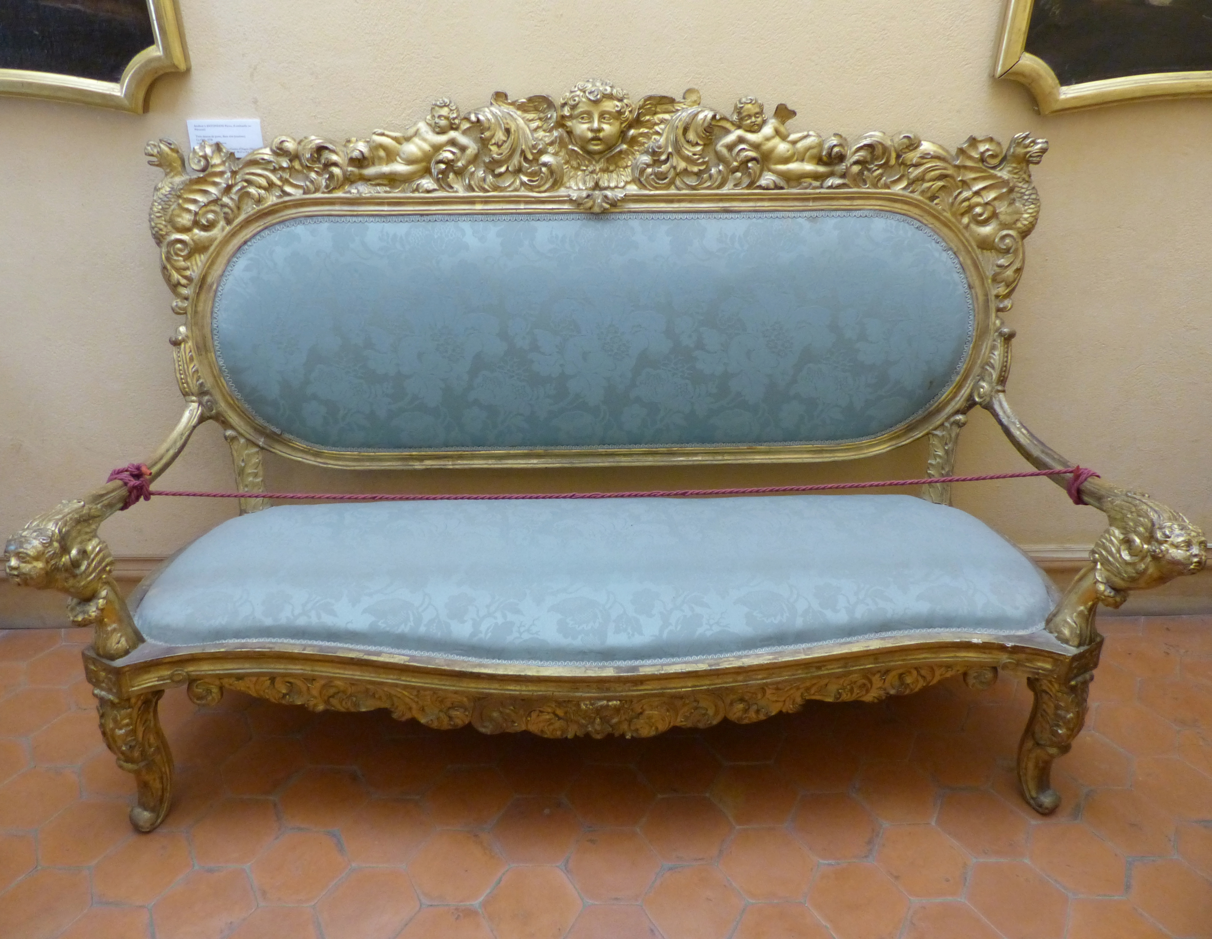 Nice (Alpes-Maritimes, France), au cœur du Vieux Nice, le palais Lascaris avec, entre autres, sa fabuleuse collection d'instruments de musique anciens, la deuxième de France.